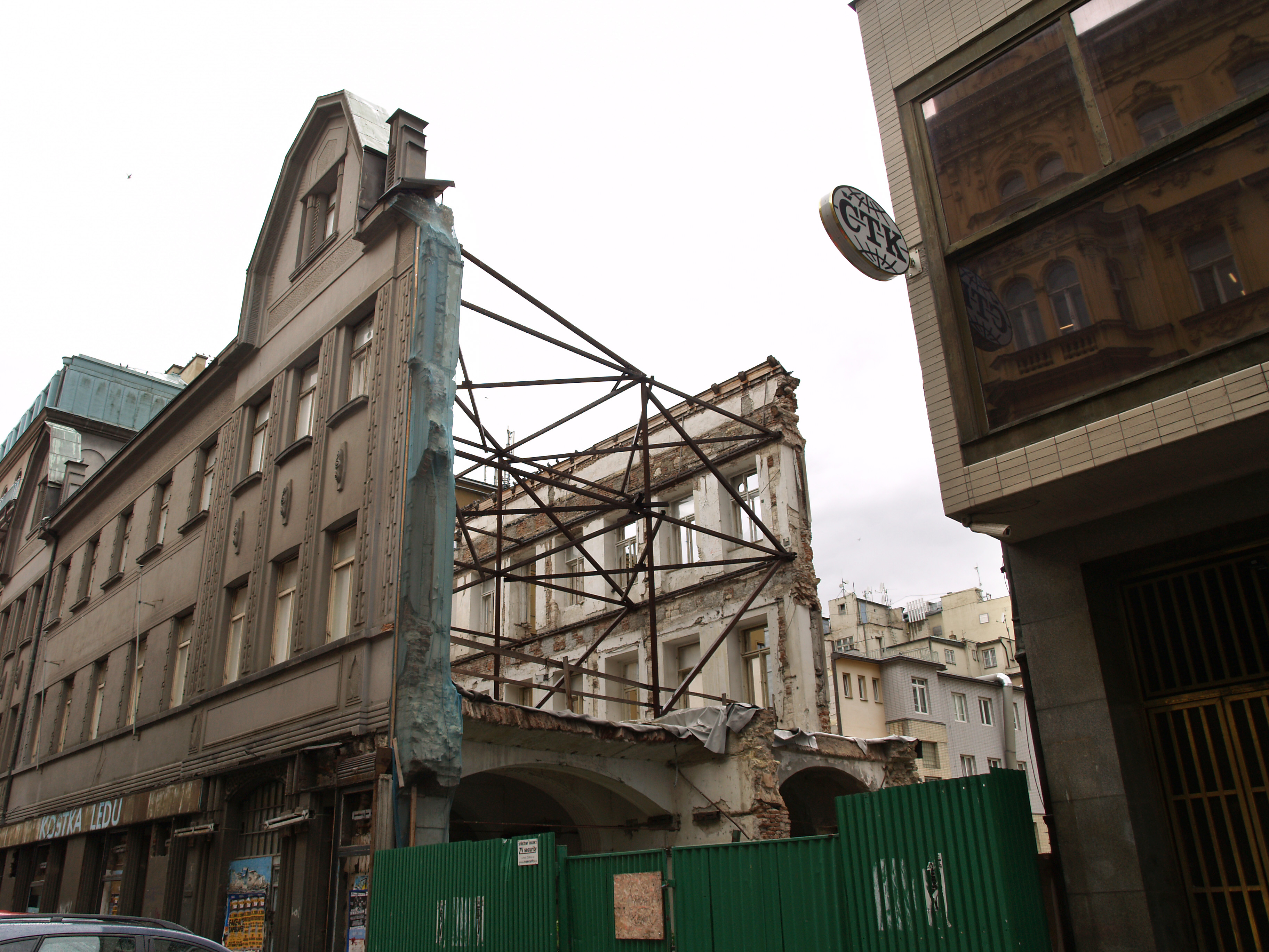 Rekonstrukce (nebo demolice?) domu Opletalova 920/3; v 17. století dům nazýván U Turků, v 19. století dům klasicistní, od roku 1911 pozdně secesní budova (přestavba podle projektu inženýra Václava Havla a stavitele J. Čámského – info zde), ve které byla Pražská akciová tiskárna, redakce Národních listů a před rokem 1990 Zemědělské noviny; roku 2003 Ministerstvo kultury ČR prohlásilo objekt za kulturní památku v definovaném a omezeném rozsahu, je zájem jej přebudovat na komerčně administrativní centrum…